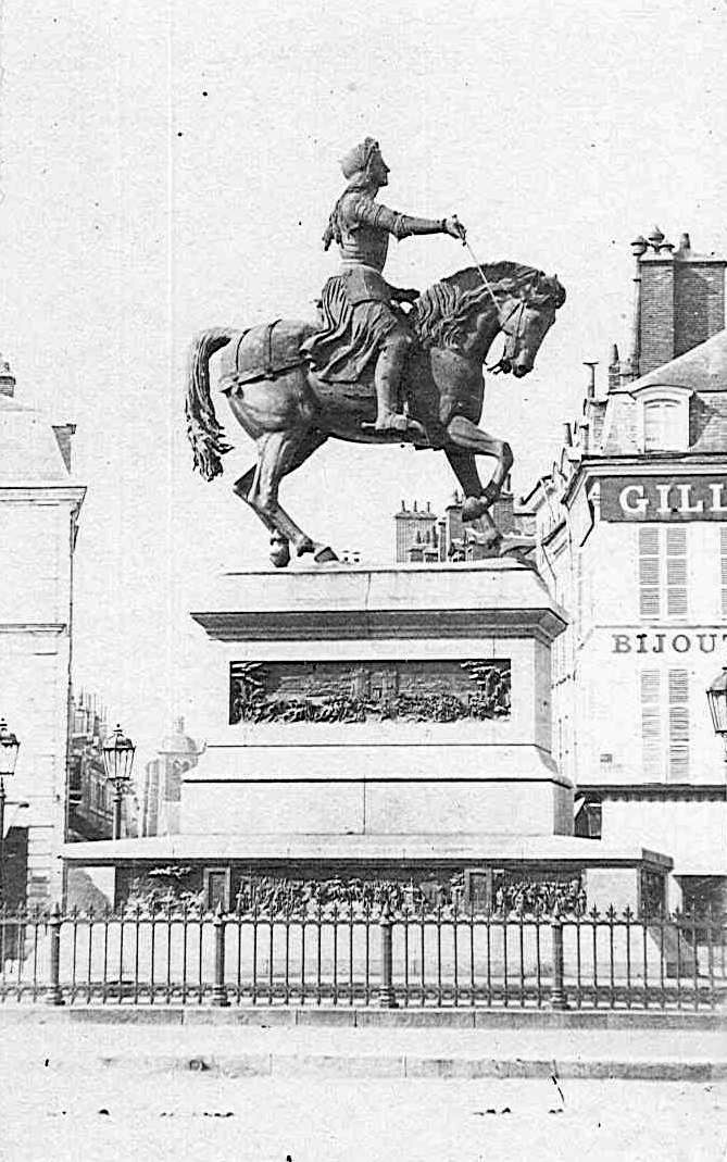 Statue de Jeanne d'Arc à Orléans crée par Denis Foyatier, vers 1875